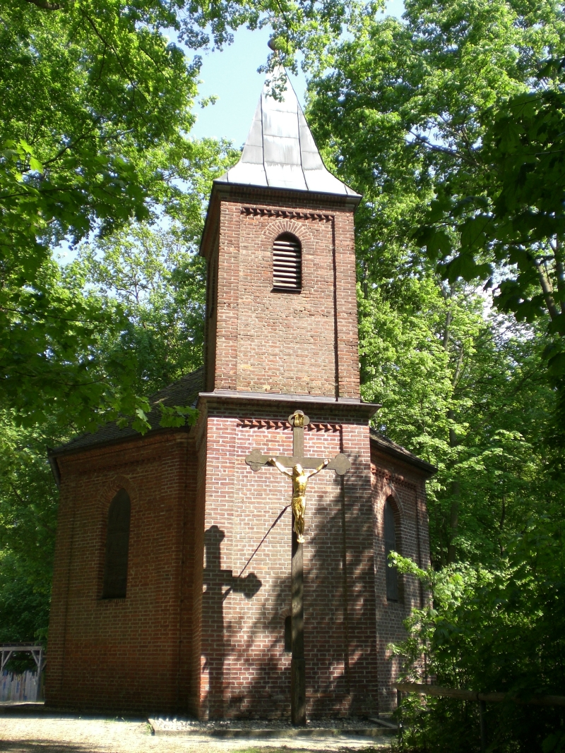 Lourdes-(auch Berg-)kapelle auf dem Kapellenberg in Ergoldsbach. Sie wurde 1895 auf Betreiben des Ortspfarrers Josef Igl errichtet.